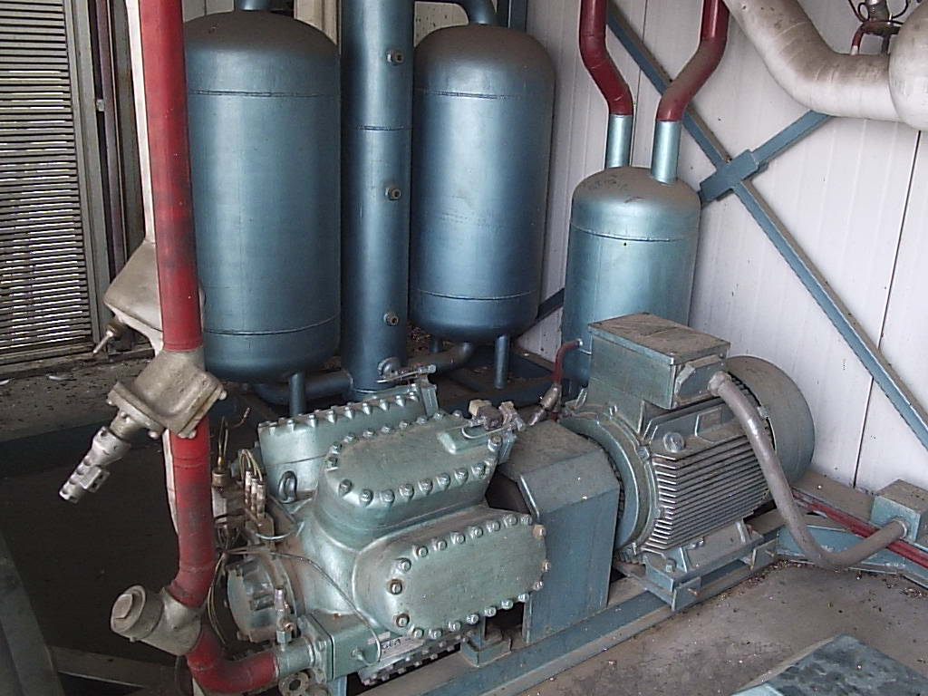 Compresor alternativo de 86Hp configuracíon "VV" para R22 de una etapa con control de capacidad.